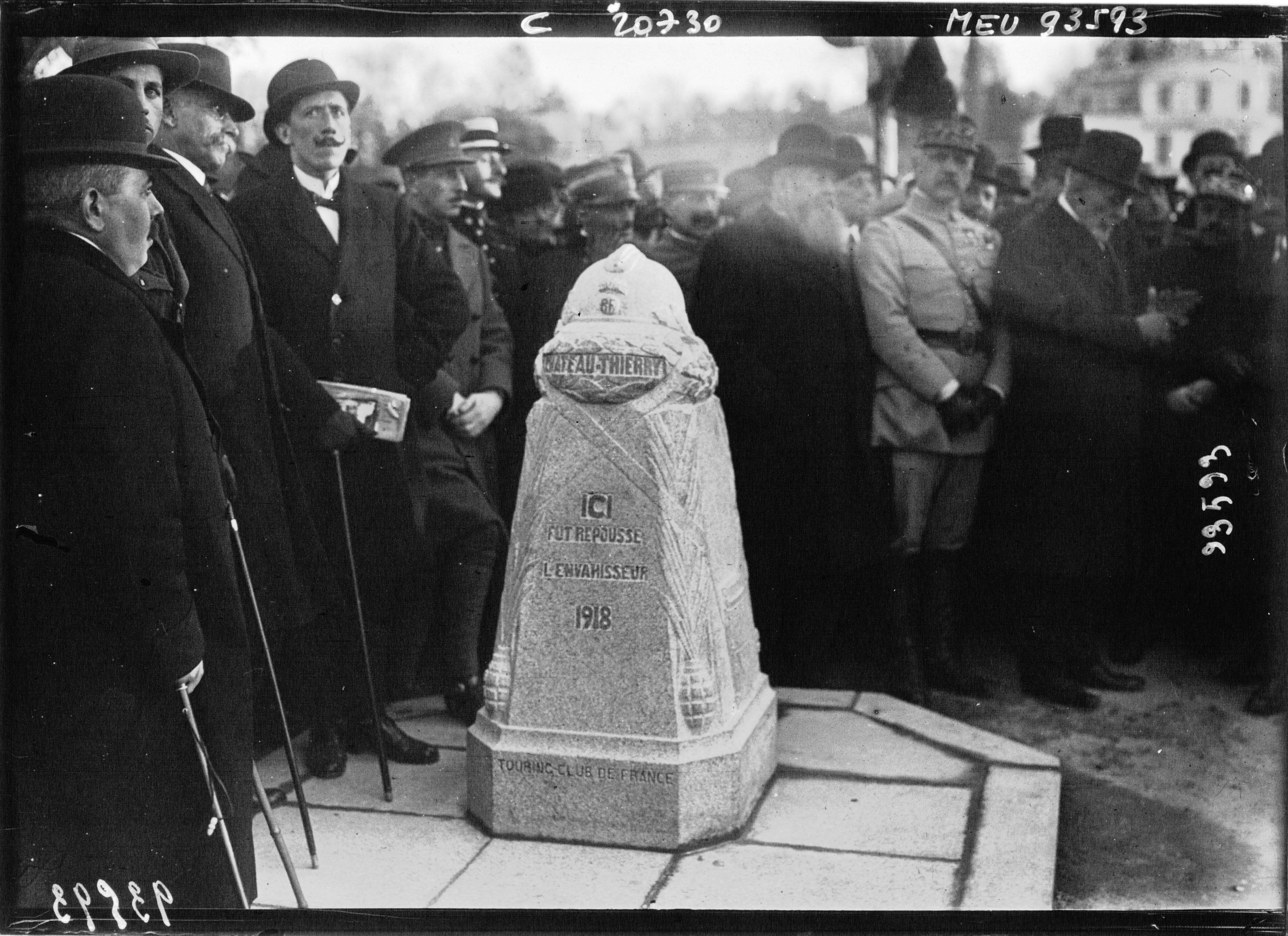 Chateau-Thierry : inauguration de la borne marquant l'arrêt de la marche allemande [Image fixe] : [photographie de presse] / Agence Meurisse Les mentions de la ville (CHATEAU-THIERRY), de la raison (ici fut repoussé l'envahisseur) et du sponsor (TOURING-CLUB de FRANCE) sont nettement visibles sur la photo.